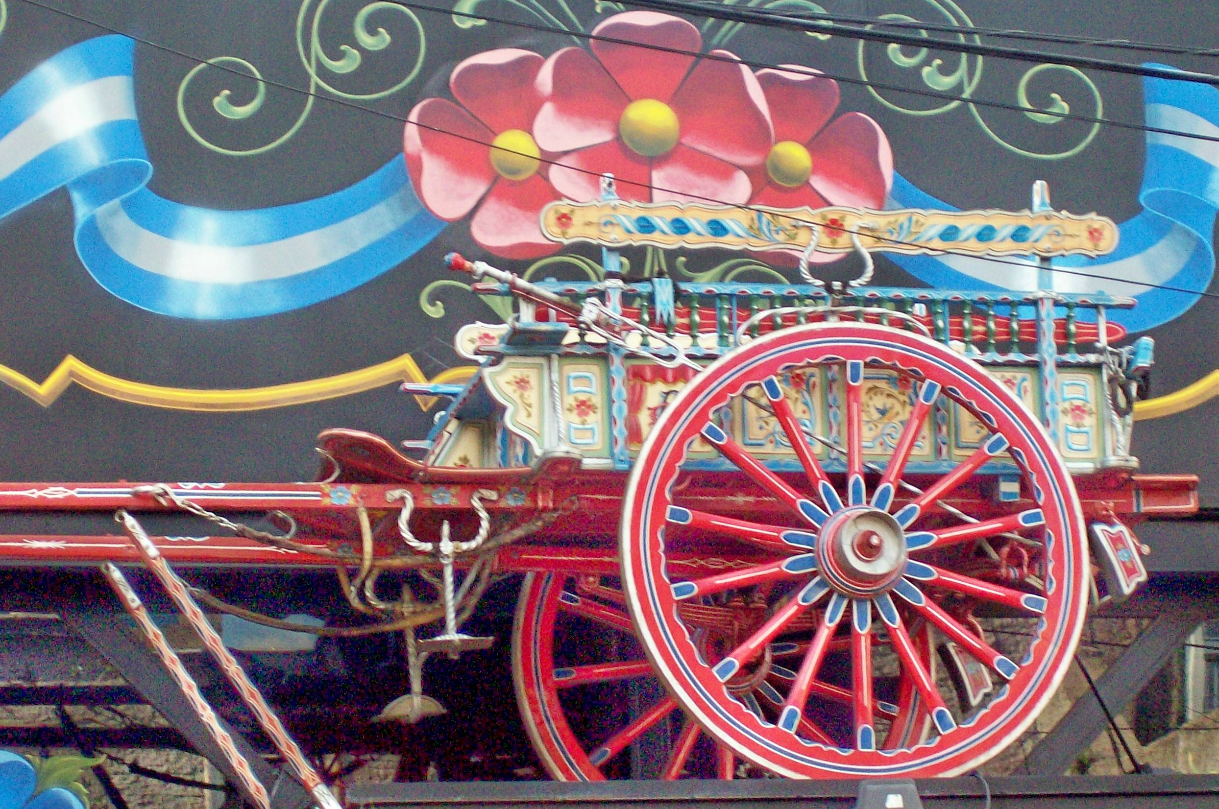 FILETEADO PORTEÑO: Carreta , en el barrio del abasto, Buenos Aires.